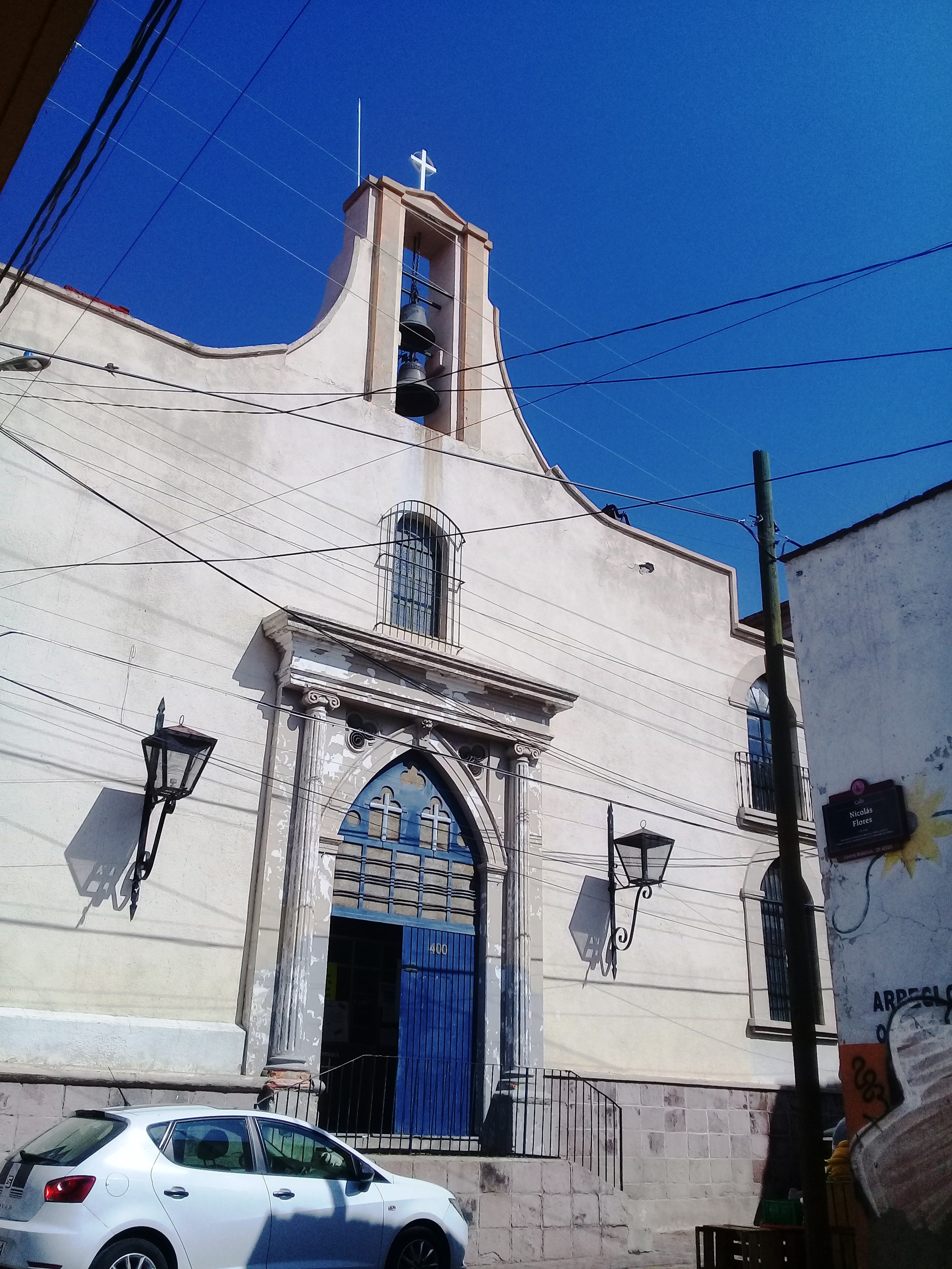 Parroquia de Nuestra Señora del Carmen, Pachuca.